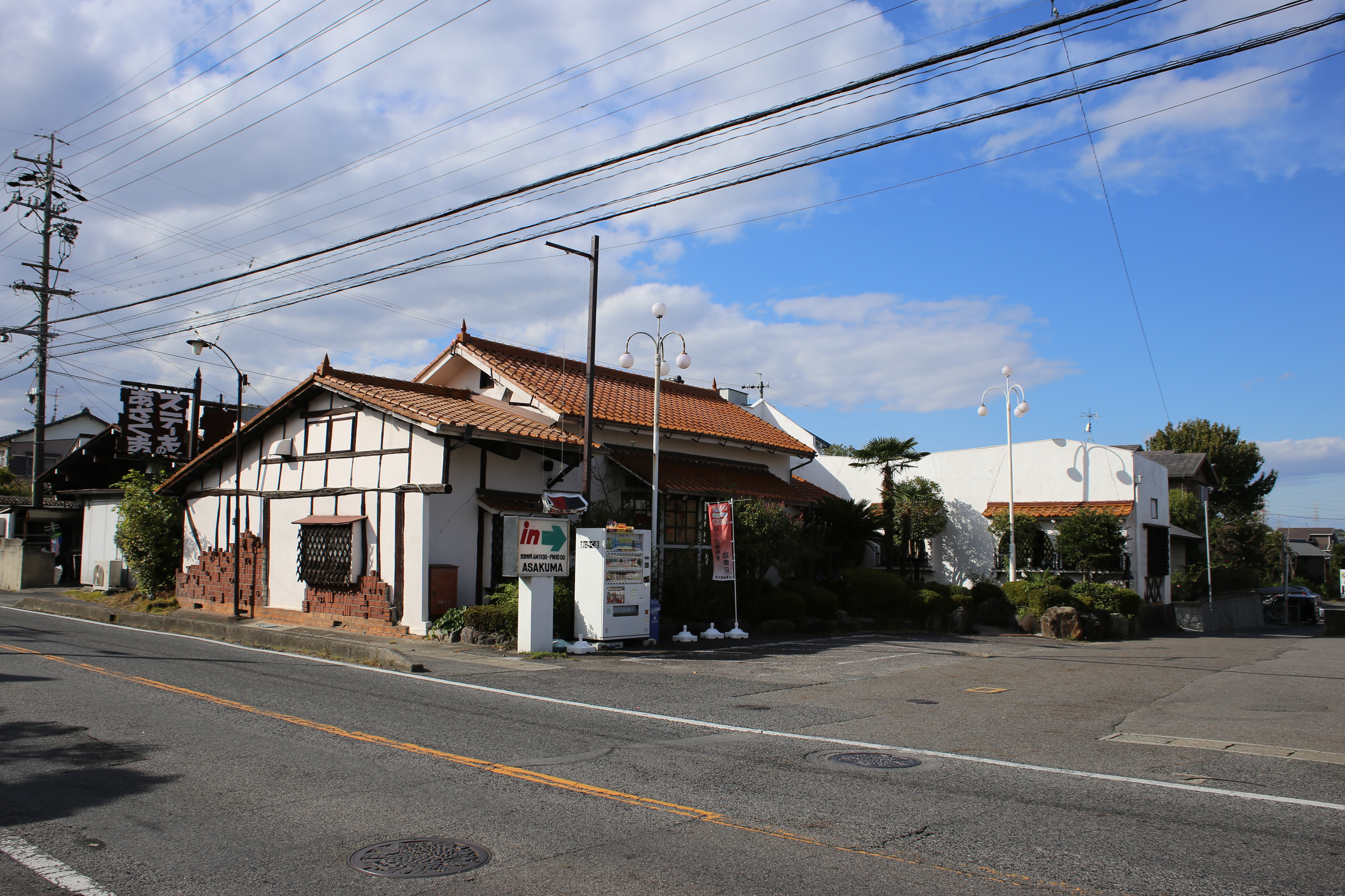 愛知県日進市赤池町に所在するステーキのあさくま本店を東側公道北側より撮影